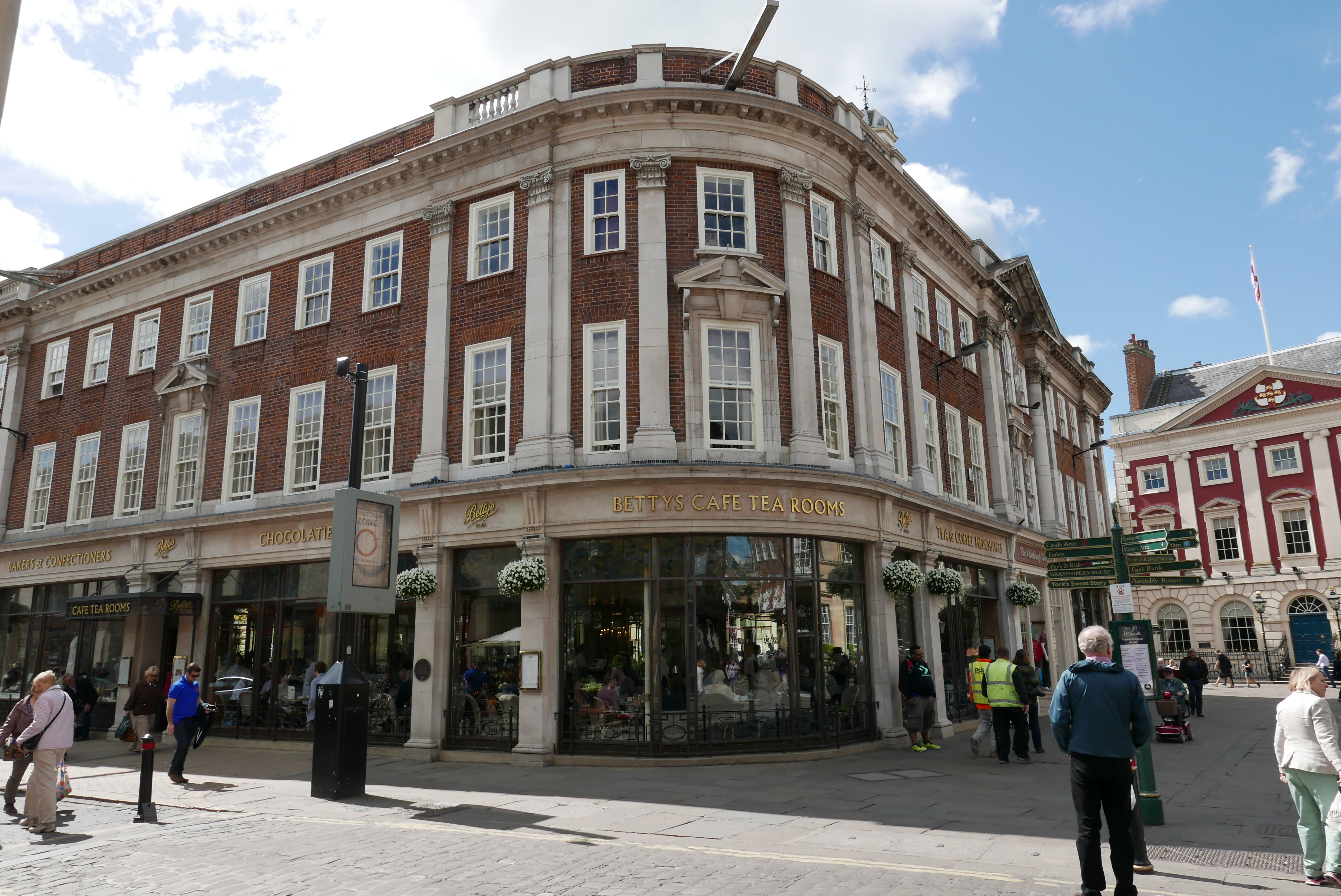 York (Angleterre). Quartier général des pilotes de la RAF pendant la Seconde Guerre mondiale. Signatures des pilotes sur un miroir dans l'établissement.